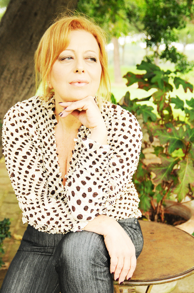 Marina Pennafina, attrice, Italia